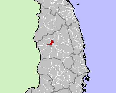 Pleiku District, Gia Lai Province, Vietnam.